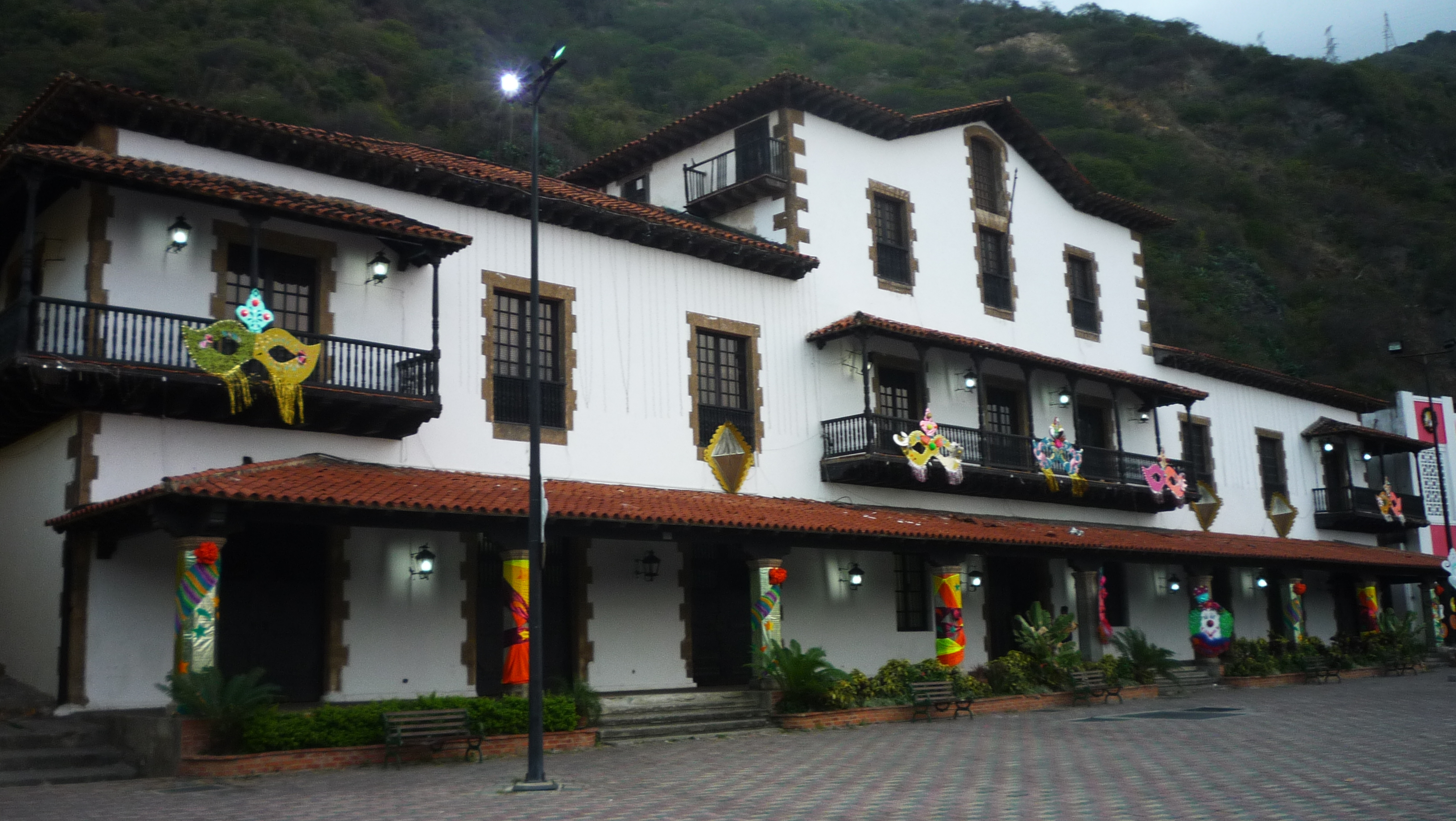 La antigua sede de la Compañía en Venezuela, un hermoso edificio con techo de ladrillos baldoza con un pequeño patio interno, típico ejemplo arquitectónico del La Real Compañía Guipuzcoana de Caracas, es en la actualidad un museo. Se encuentra en el puerto venezolano de La Guaira, cercano a Caracas. Afortunadamente, esta reliquia histórica no resultó deteriorada durante las inundaciones ocurridas en el Estado Vargas en diciembre de 1999.